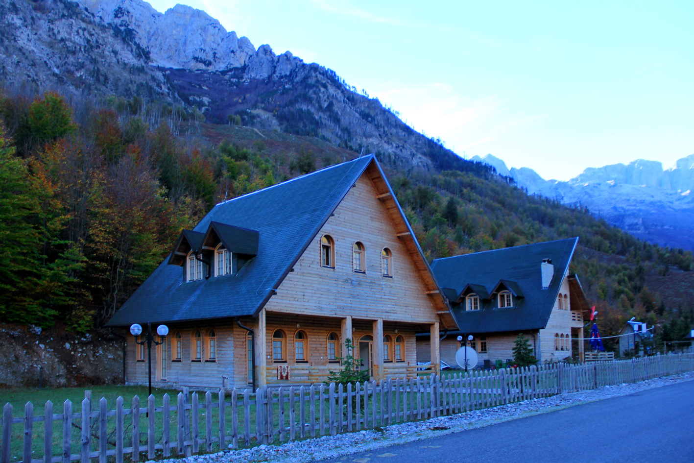 Vila Pushimi - Fshati Valbonë